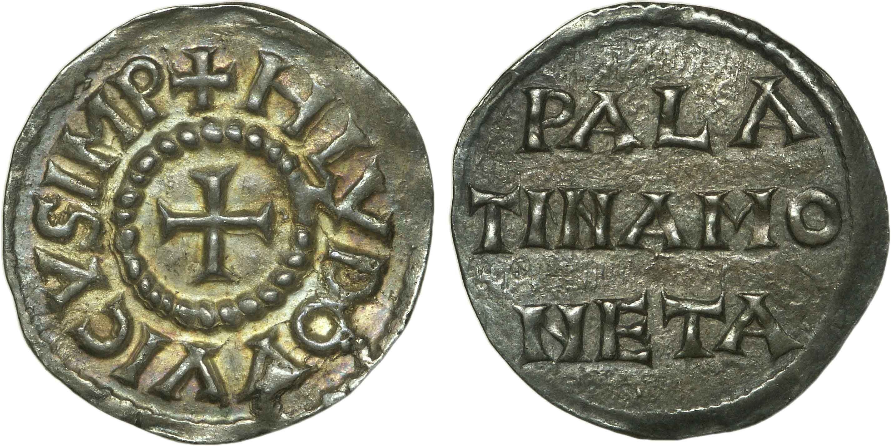 Nom de l'atelier/ville : Le Palais Métal : argent Diamètre : 20,5mm Axe des coins : 6h. Poids : 1,76g. Degré de rareté : R2 Titulature avers : + HLVDOVVICVS IMP. Description avers : entre deux grènetis ; au centre, croix. Traduction avers : (Louis, empereur). Titulature revers : PALA/ TINA MO/ NETA. Description revers : en trois lignes dans le champ. Traduction revers : (Monnaie du Palais).